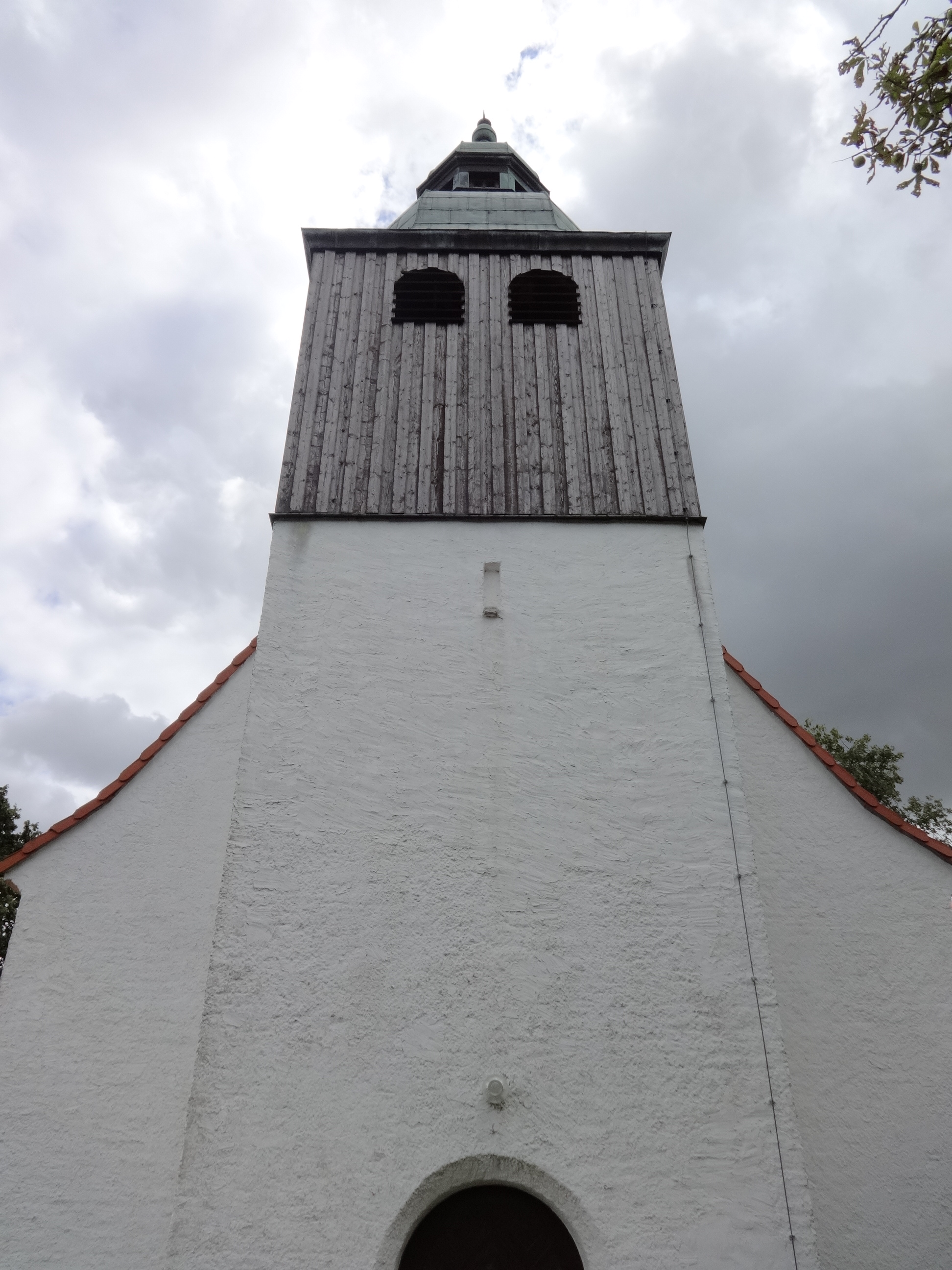 Dorfkirche Zemitz: Der schlichte Putzbau entstand im 18. Jahrhundert als Kapelle und wurde 1913 zur Saalkirche umgebaut. In dieser Zeit erhielt sie auch den barockisierenden Westturm. 1999 erfolgte die Namensgebung St. Michael nach einer umfassenden Sanierung. Im Inneren schlichte Ausstattung mit hölzerner Tonnendecke.